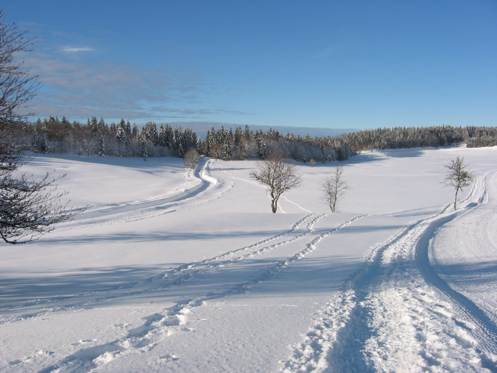 Le Plateau de Retord sous la neige, Ain, France Photo prise le 7 février 2003 Aut : Jddmano